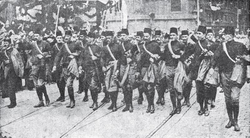 Скопското българско юнашко дружество в Прага в 1912.